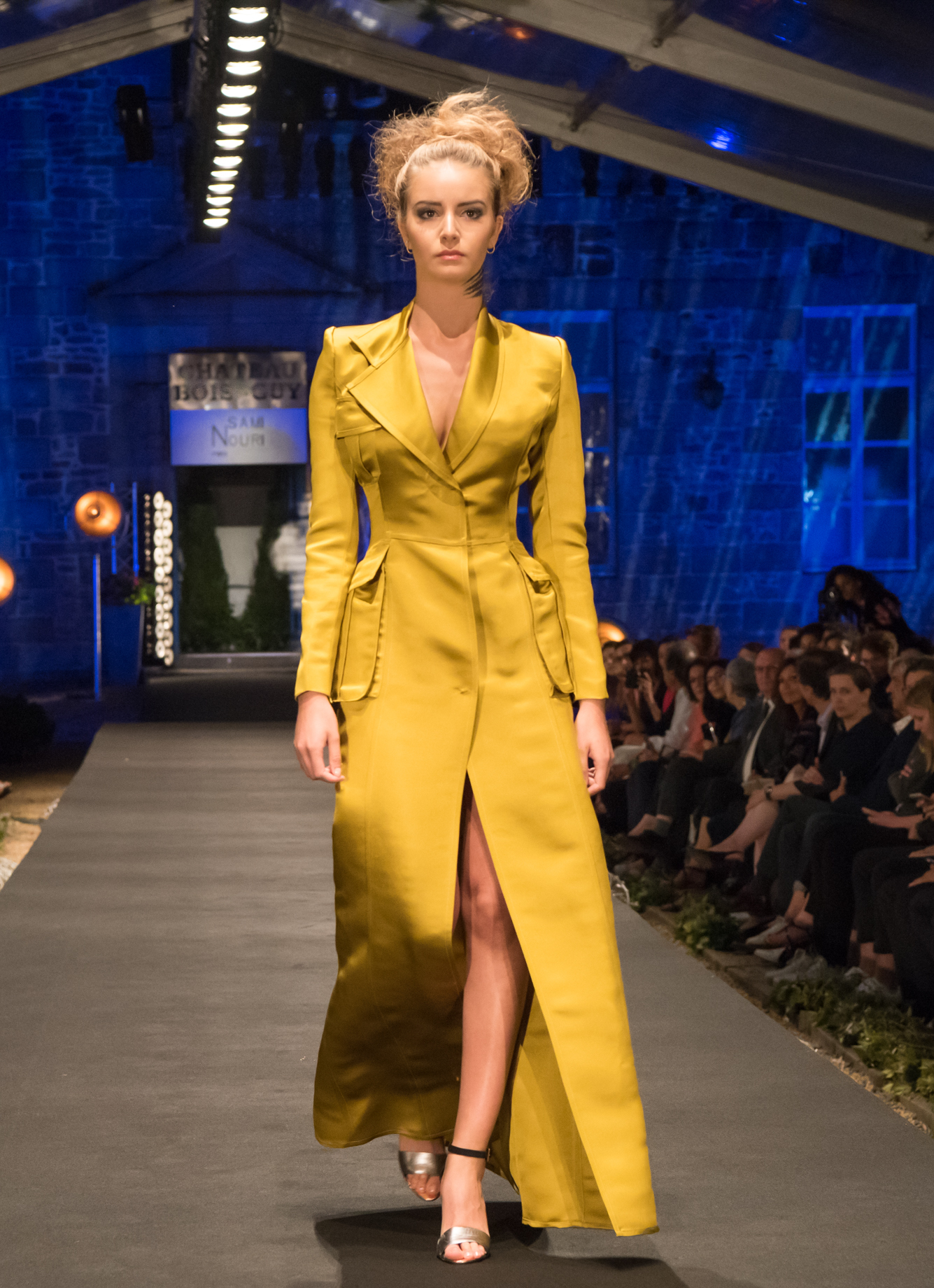 Sami Nouri Paris robe manteau.